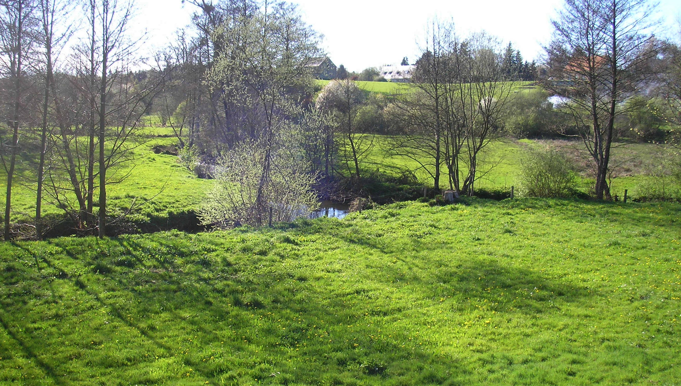 Confluent du Noireau et de la Diane entre Montsecret, à l'arrière-plan, et Saint-Pierre-d'Entremont, au premier plan (Normandie, France).